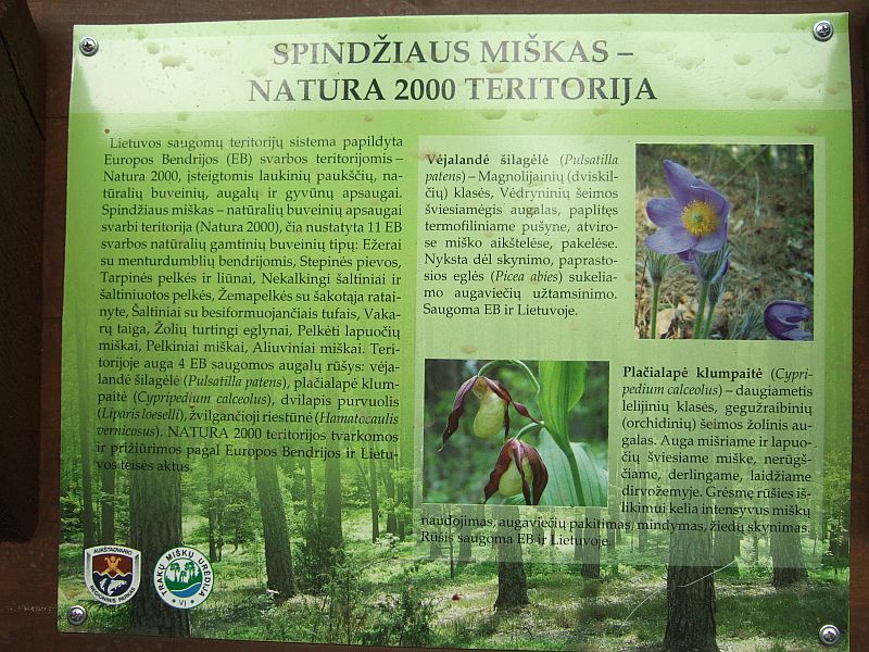 Natura 2000 stendas Aukštadvario regioniniam parke